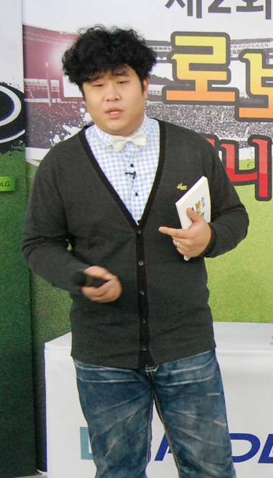 LG전자가 1일 논현동의 온라인 방송국 ‘라이프스 굿 스튜디오’에서 로봇청소기로 축구경기를 하는 이색적인 행사인‘제 2회 로보킹 미니 축구대회’를 개최했다. 참석자들이 LG전자 로봇청소기 '로보킹 듀얼아이'로 경기를 하는 모습.